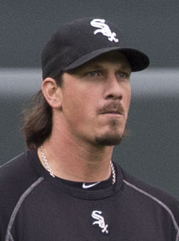 Jeff Samardzija